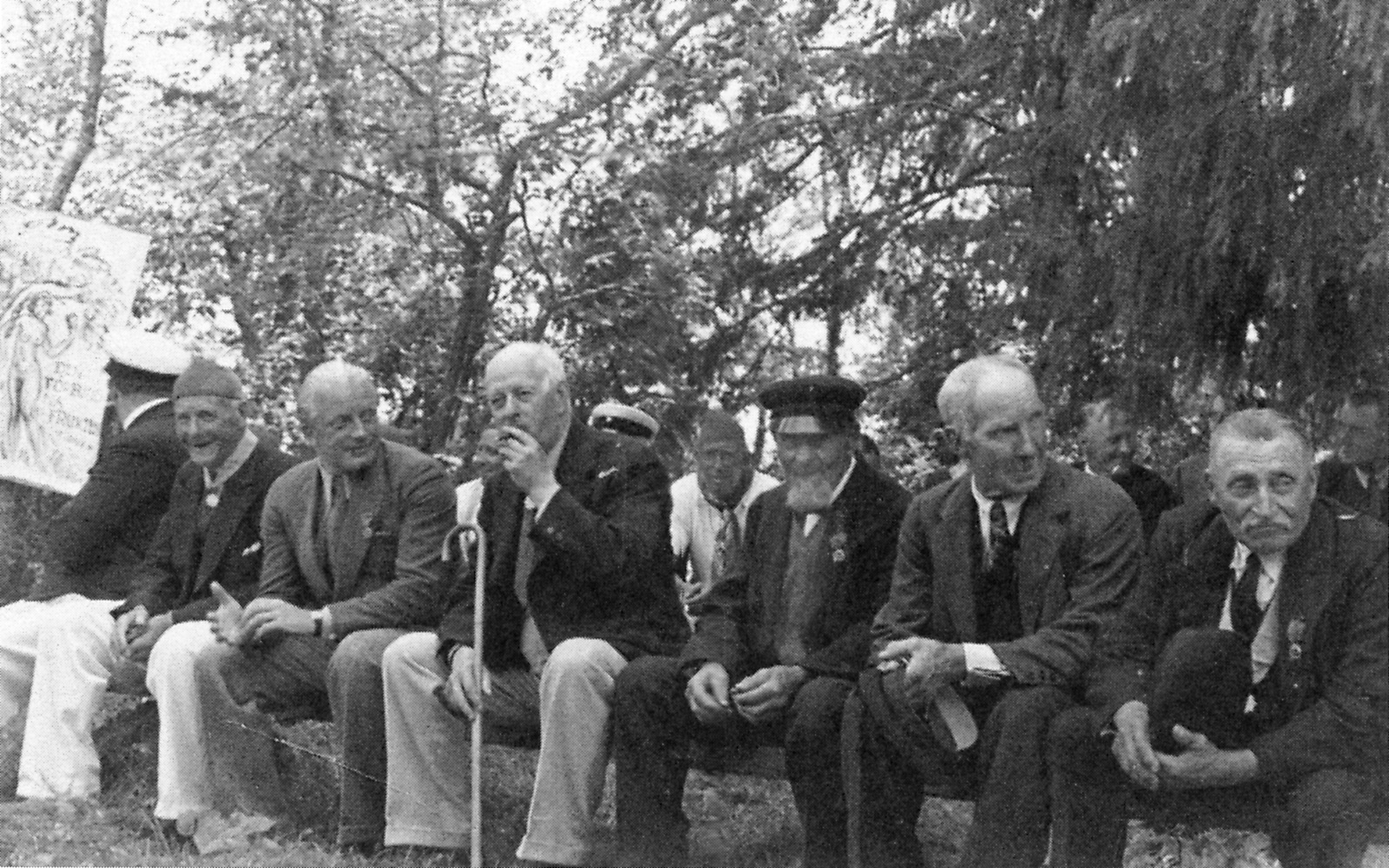 Pelarordens sommarting på Håtö Svansar, cirka 1935. Från vänster: Carl von Schewen, Einar Malm, okänd (med käpp), Johan Eric Westerberg, Edvard Österman och Jan-Erik Andersson.